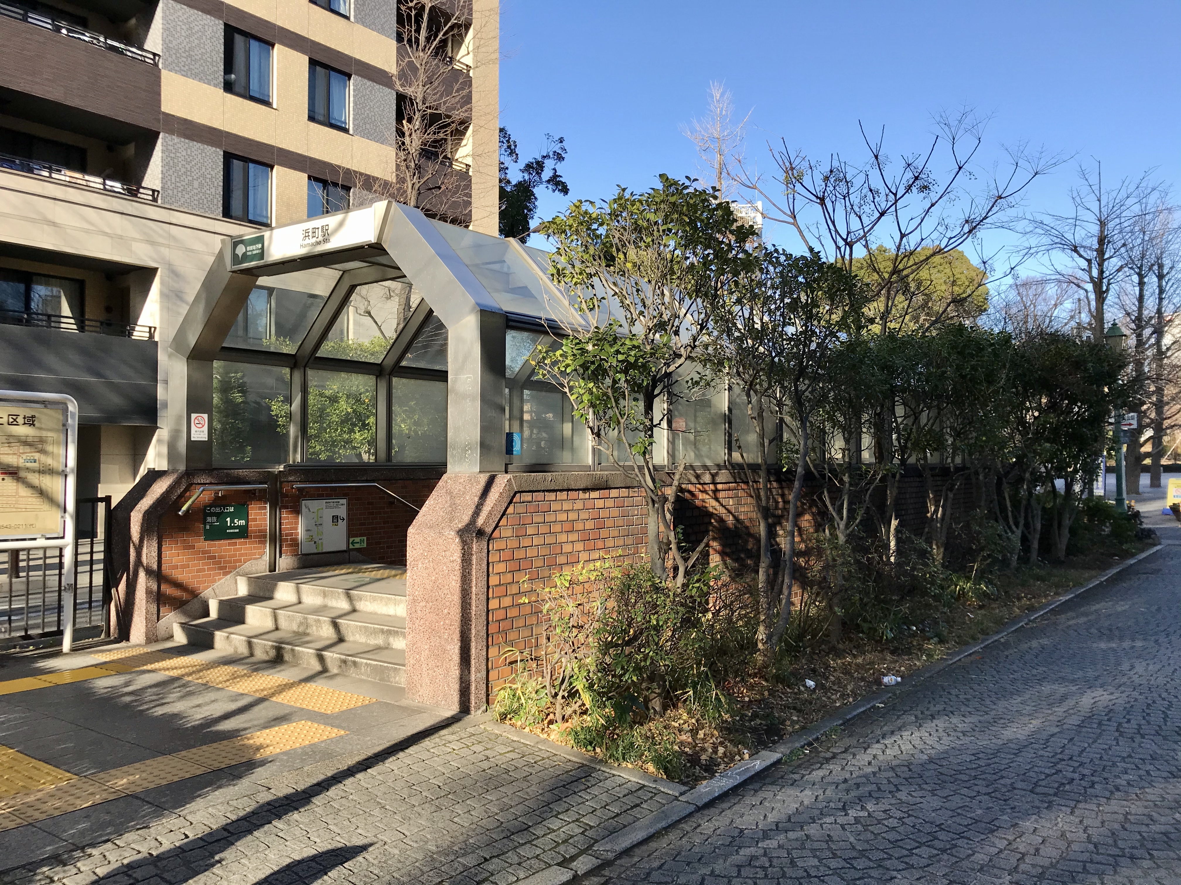 都営地下鉄新宿線浜町駅A2番出入口